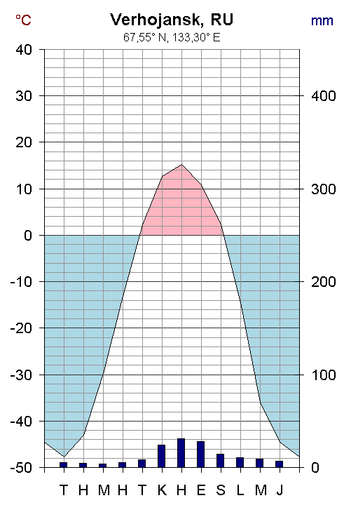 Verhojanskin ilmastodiagrammi.